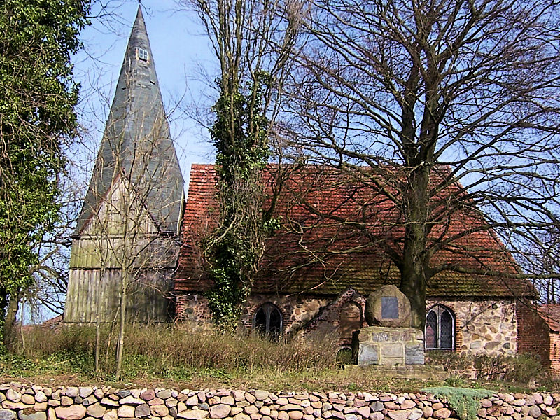 Kirche in Below, Landkreis Parchim